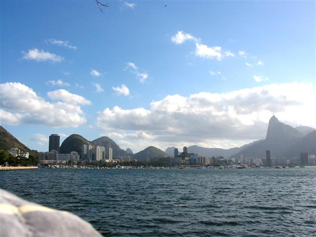 Vue de Rio de Janeiro depuis Urca Photo personnelle prise en 2003, publiée sous licence GFDL